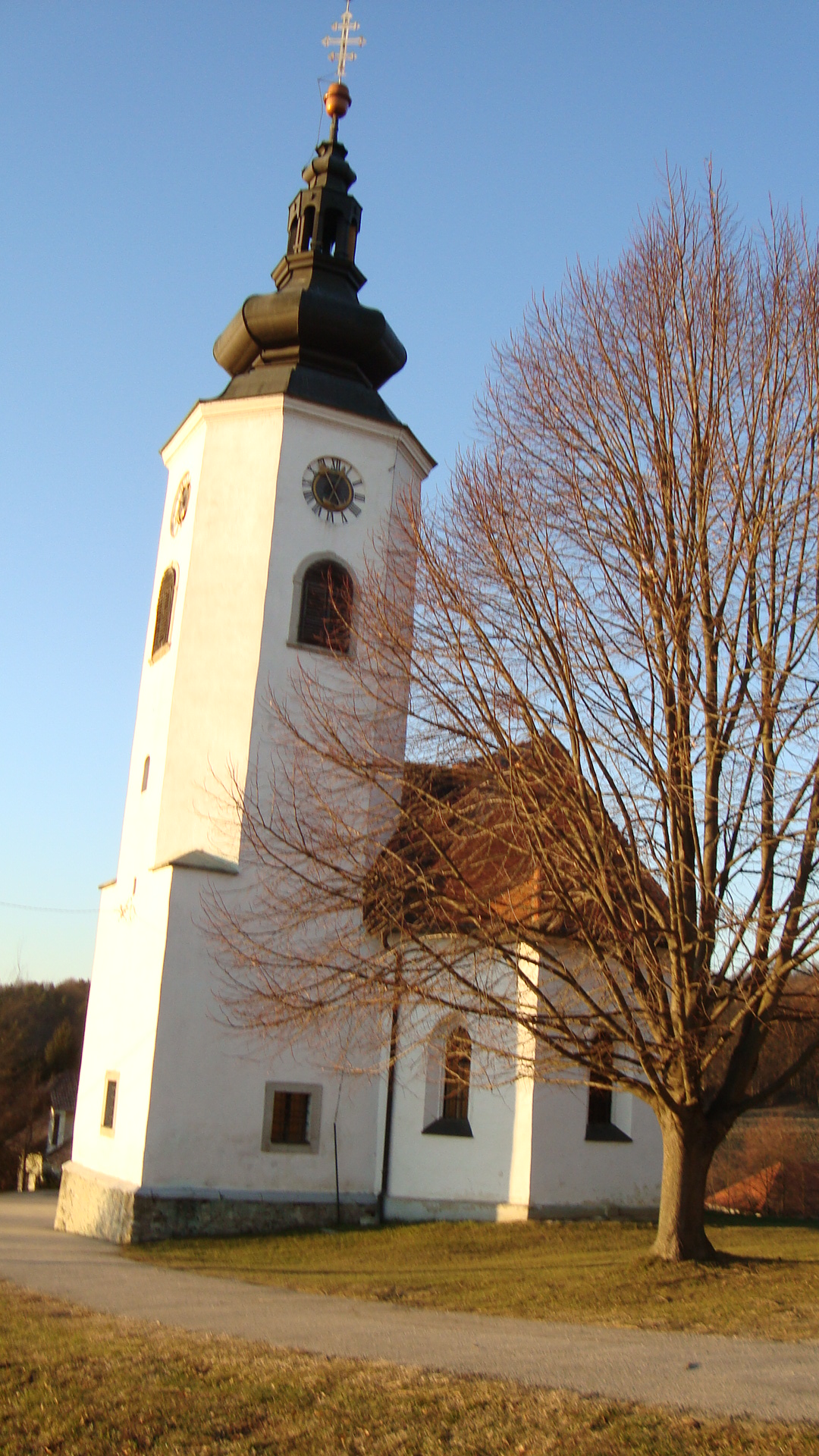 slika cerkve od blizu